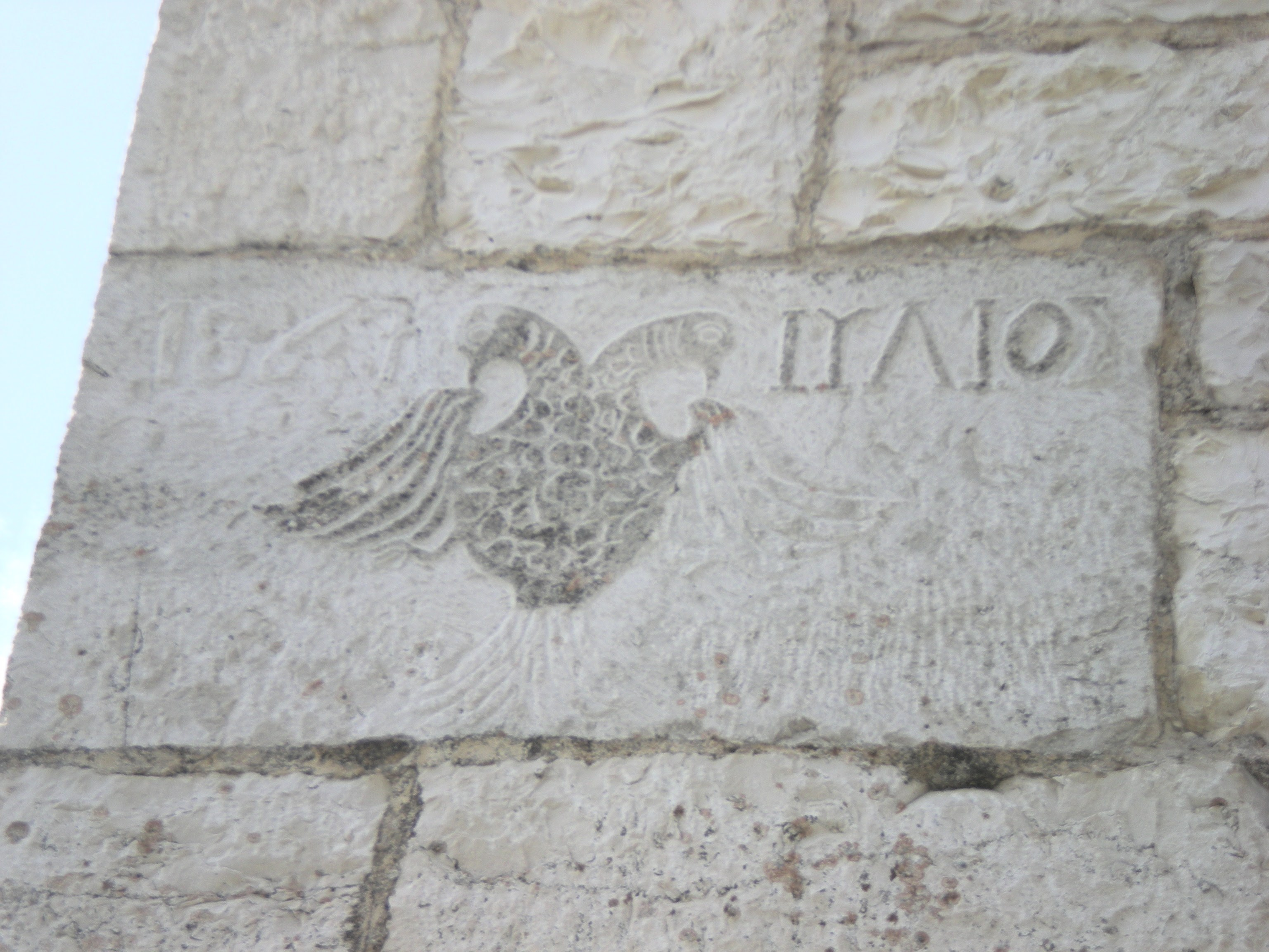 Η επιγραφή με το έτος ανέγερσης της εκκλησίας των Σωφρατίκων (1867) εντοιχισμένη στον Βόρειο τοίχο.